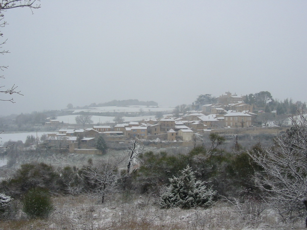 Murs en hiver